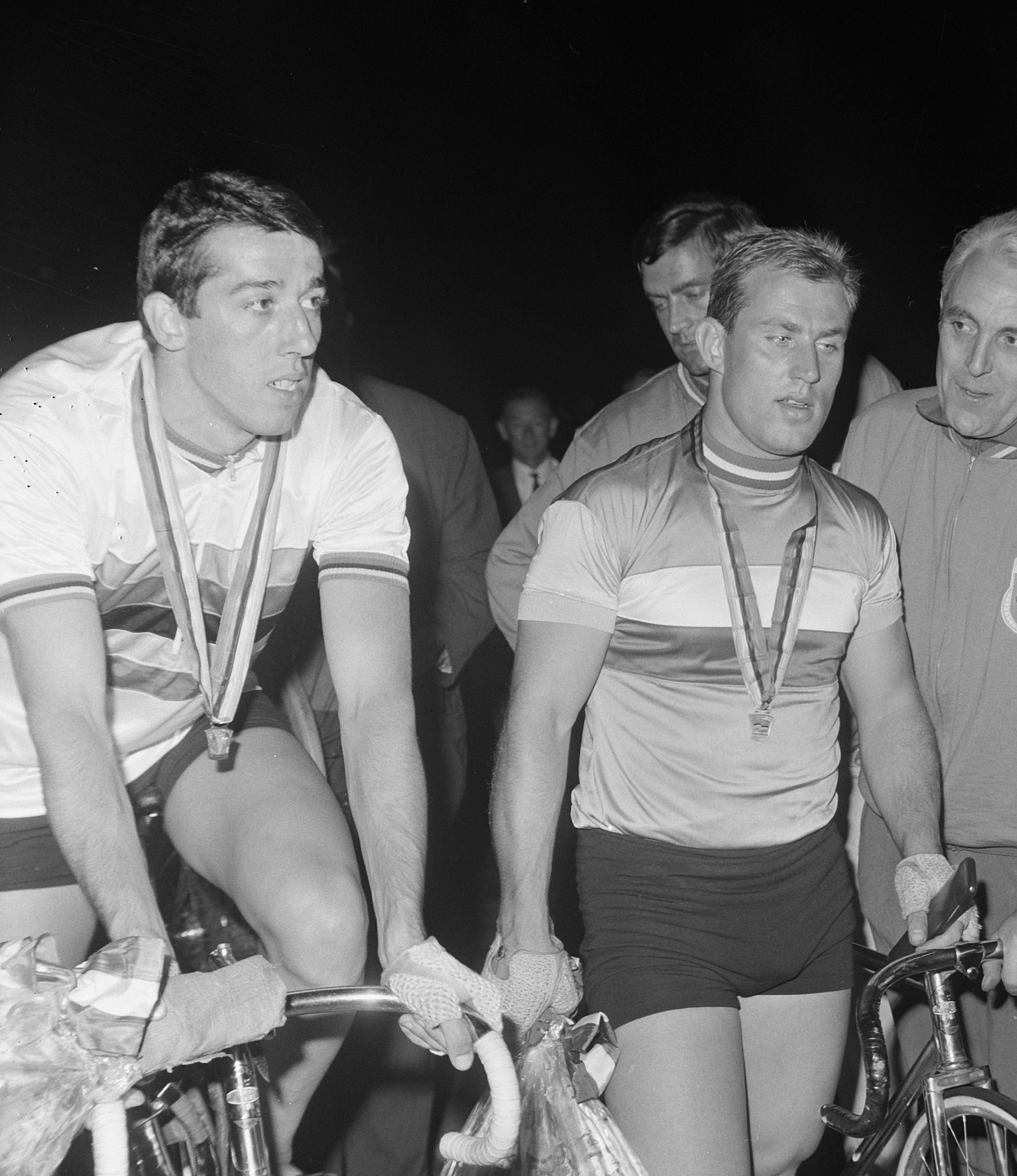 WK Wielrennen, Sprint amateurs. Morelon en Terintin (beiden Frankrijk)